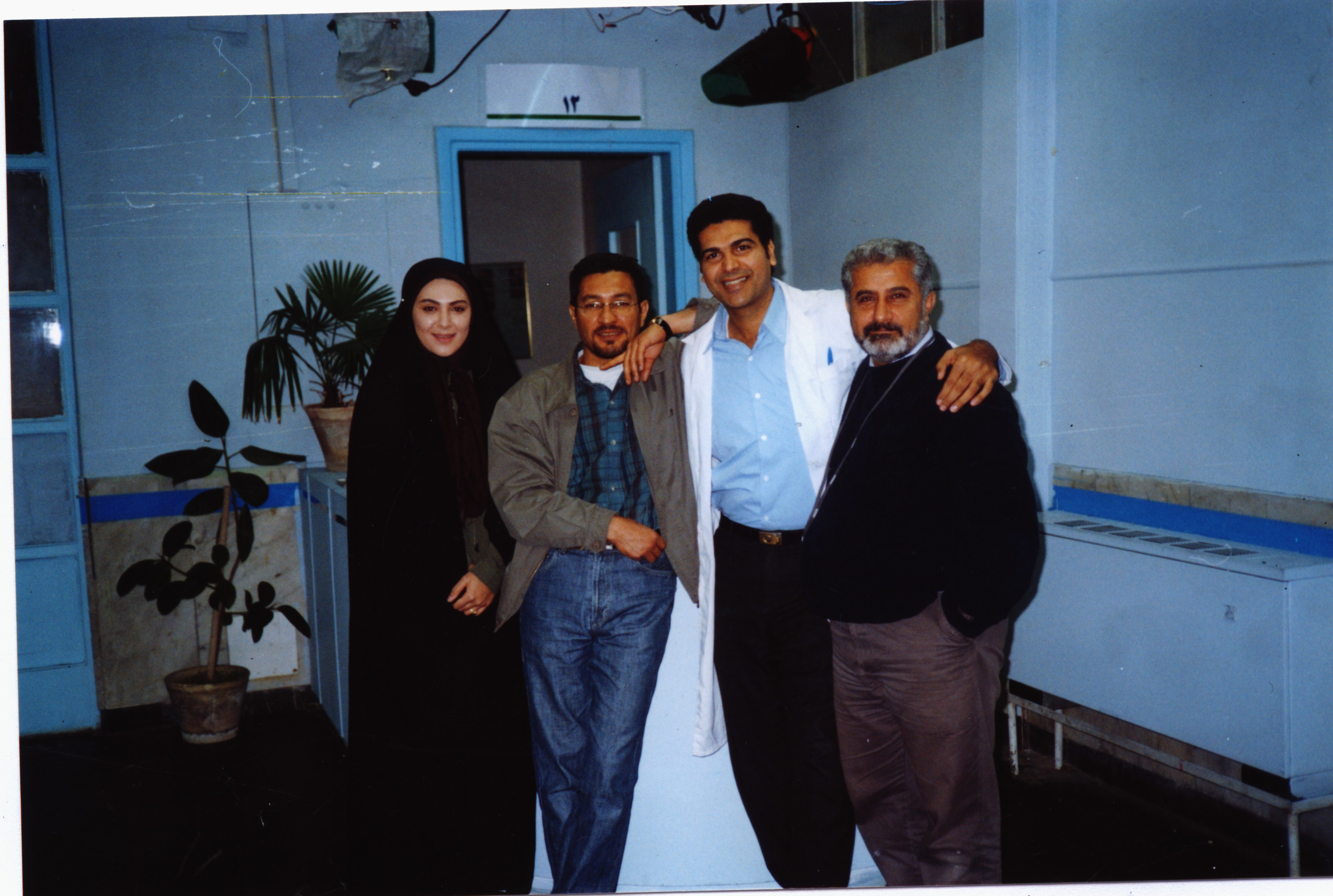 علی بوریان در پشت صحنه سریال قفسی برای پرواز